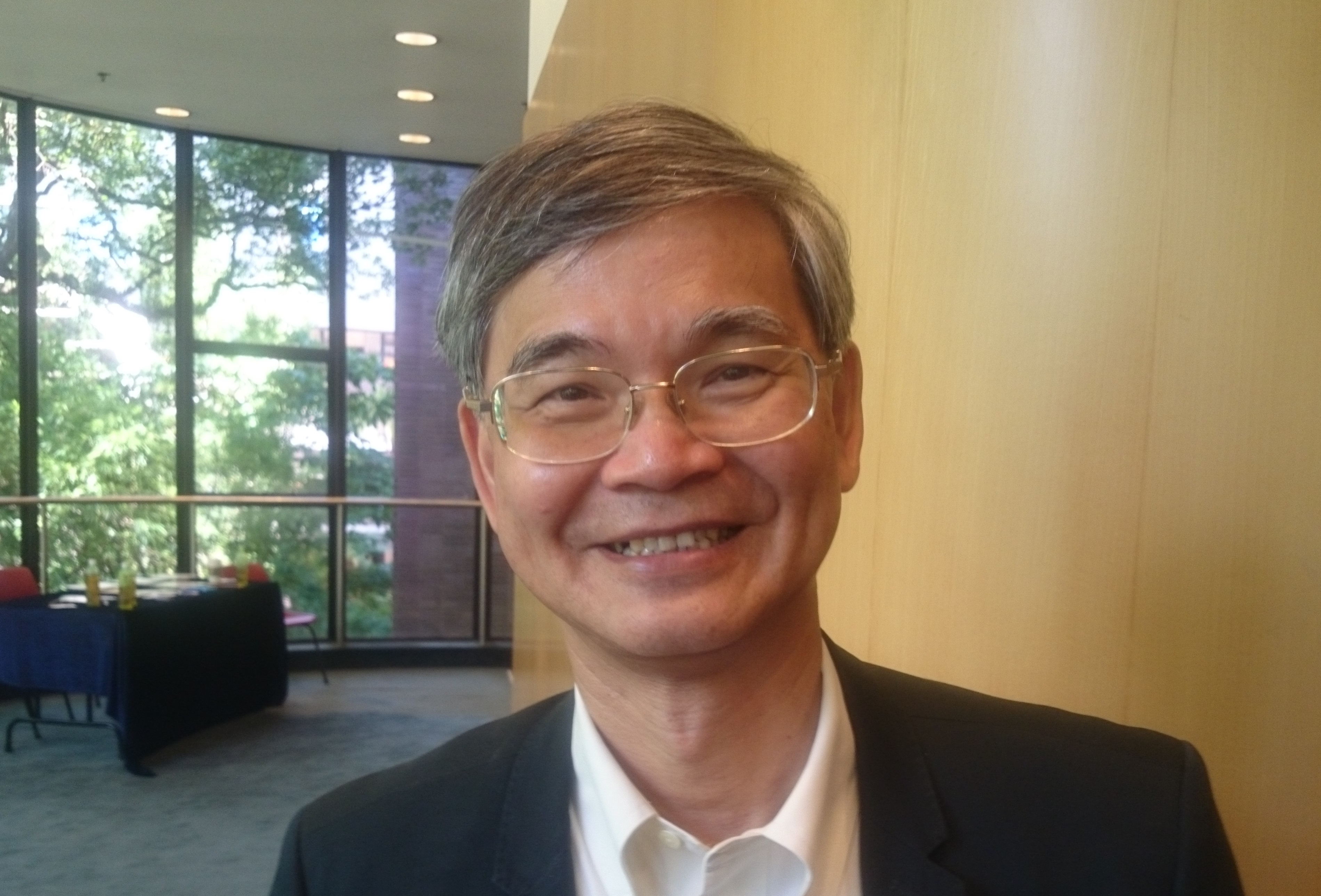 粵語: 2017年8月19號，羅致光喺香港大學度。